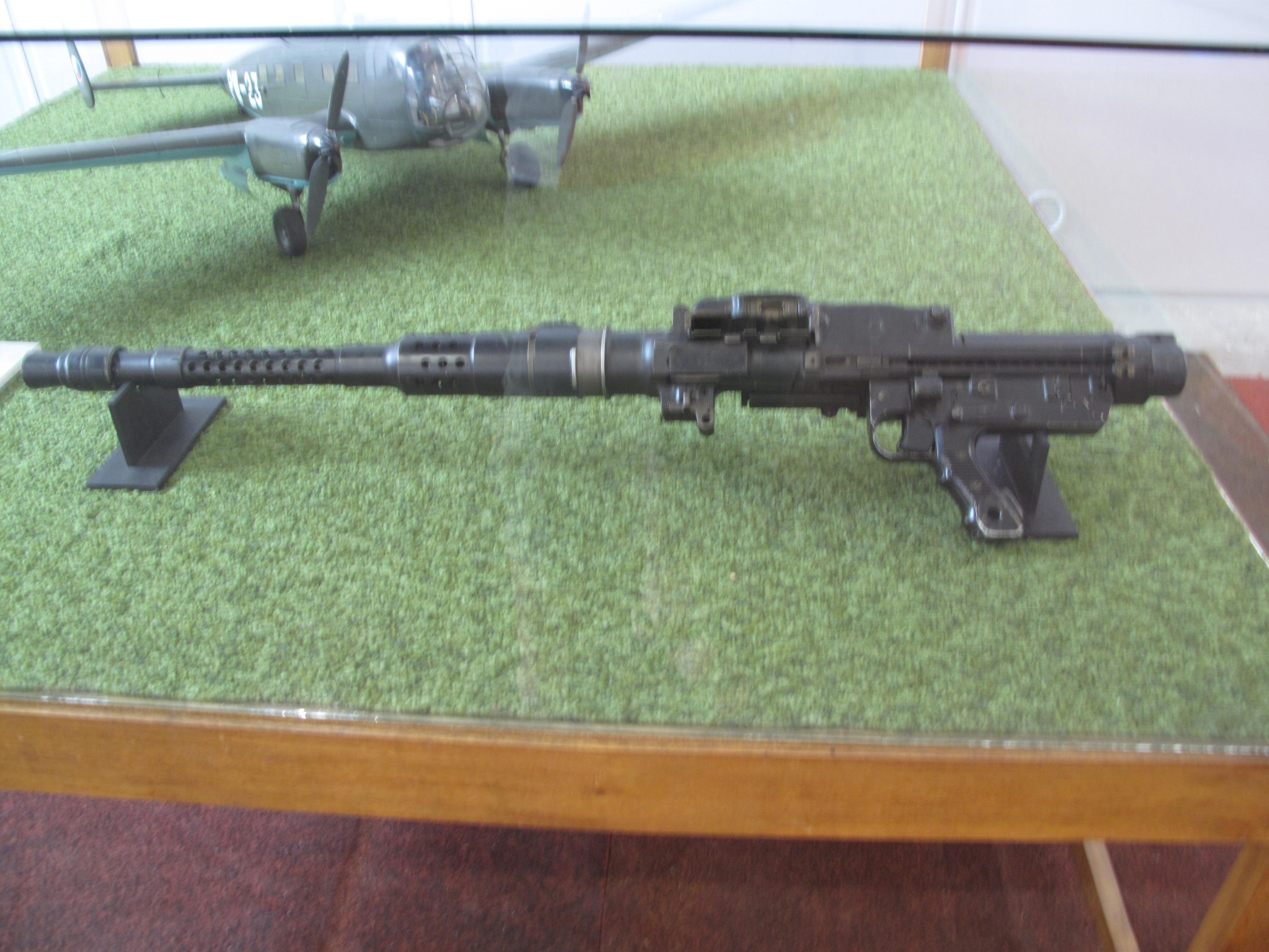 Letecké muzeum Kbely